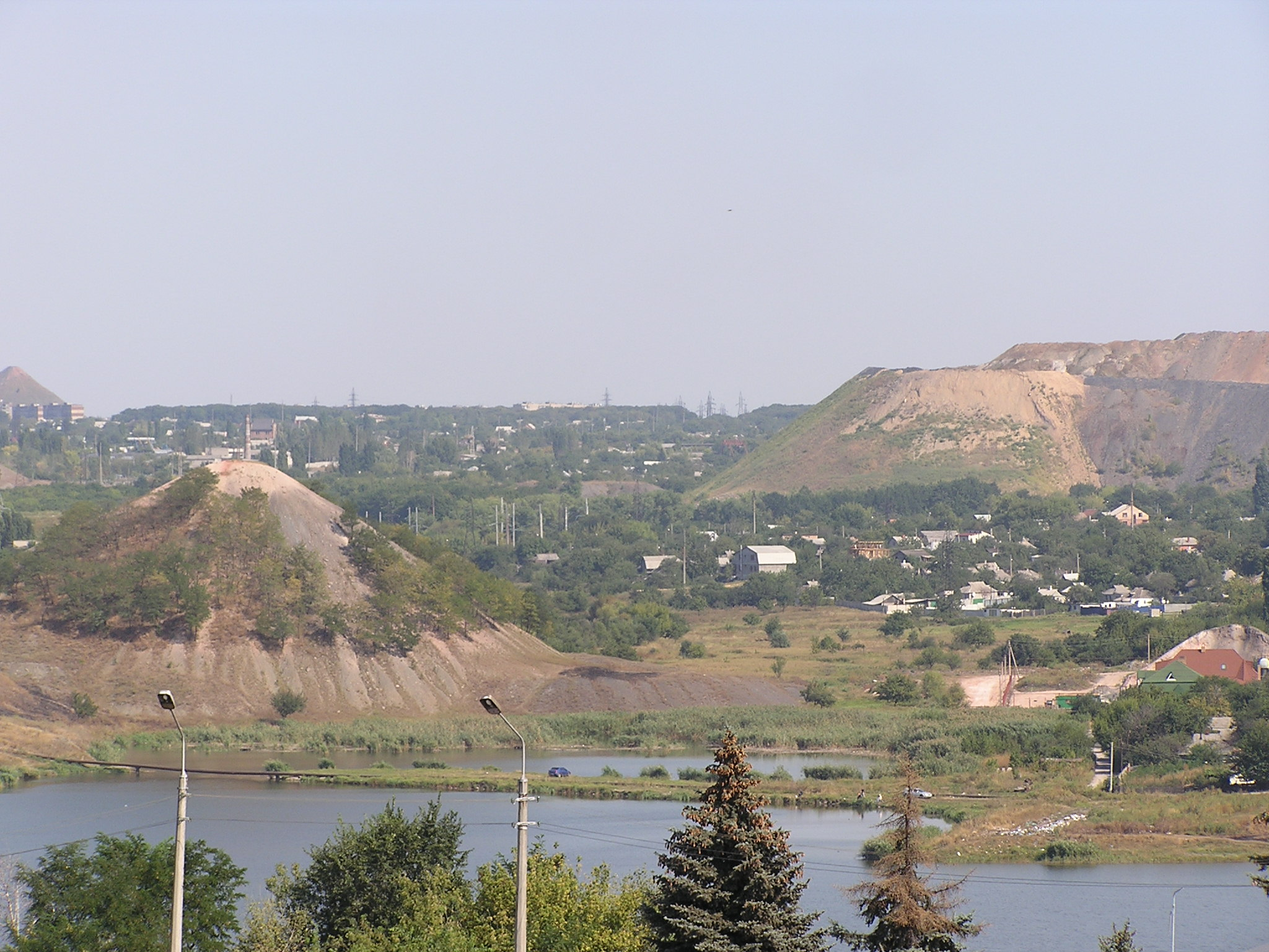 Киевский район Донецка.